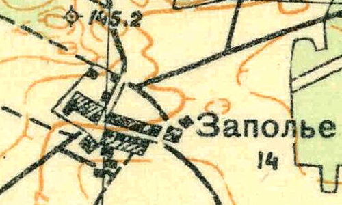 Топографическая карта Ленинградской области, квадрат О-35-24-А-г (Горки), деревня Заполье